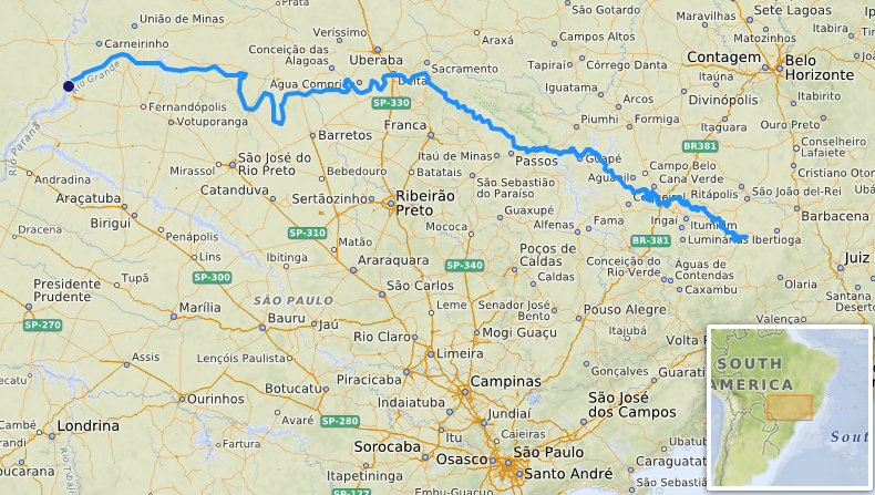 carte réalisée sur umap [1] This map may be incomplete, and may contain errors. Don't rely solely on it for navigation.